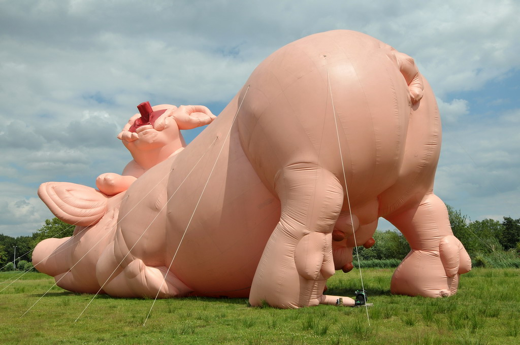 Piggies, 2007 (Botanische tuin Uithof, Utrecht) 'Dominant en onvermijdelijk maar slechts gevuld met lucht'. Made by Paul McCarthy (1945).